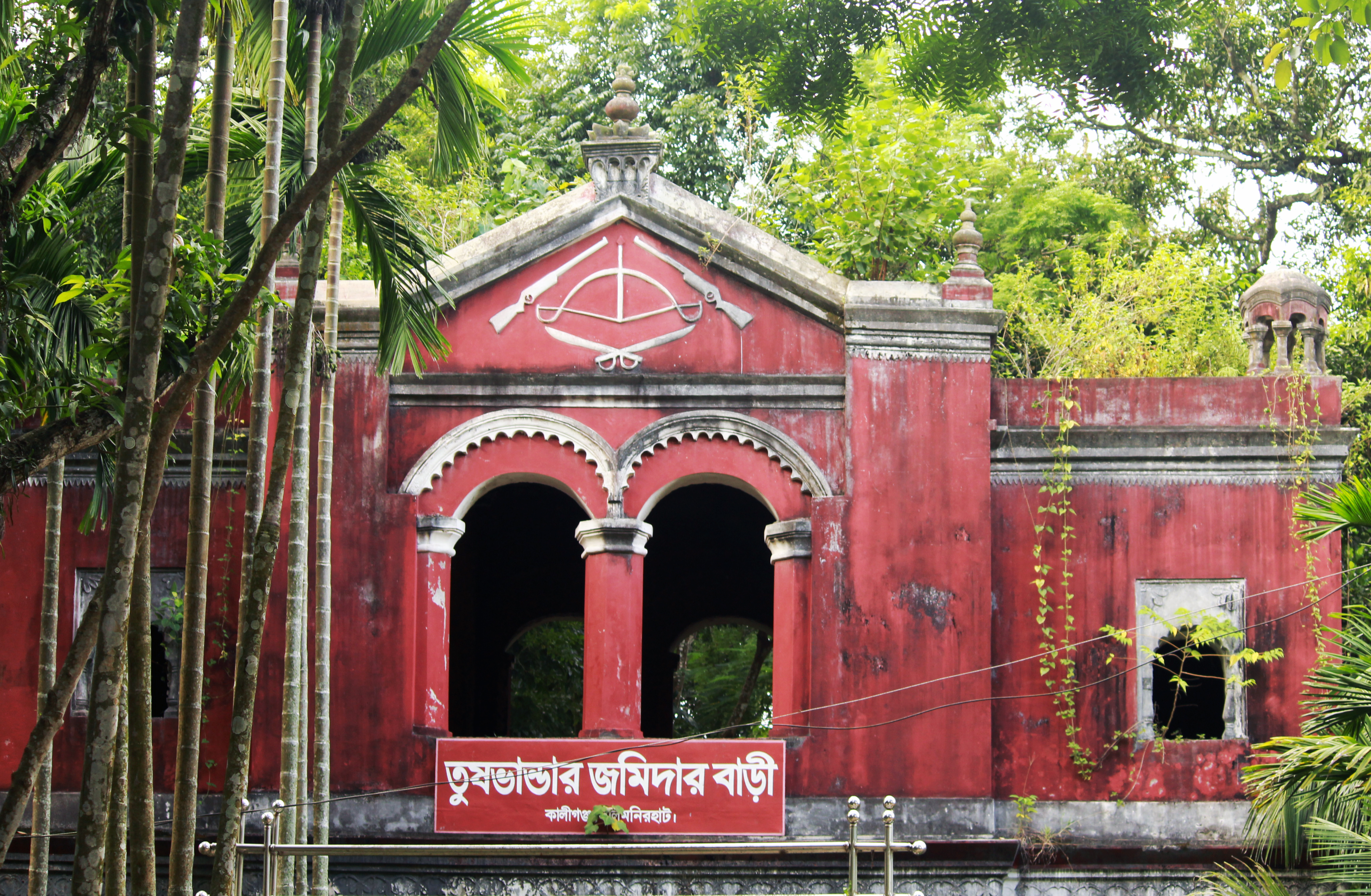 তুষভান্ডার জমিদার বাড়ি